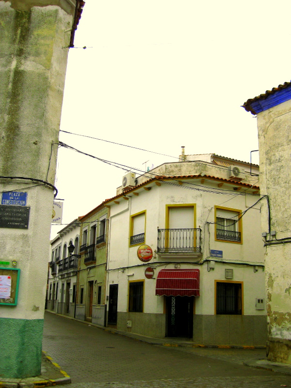 Centro de Villaralto